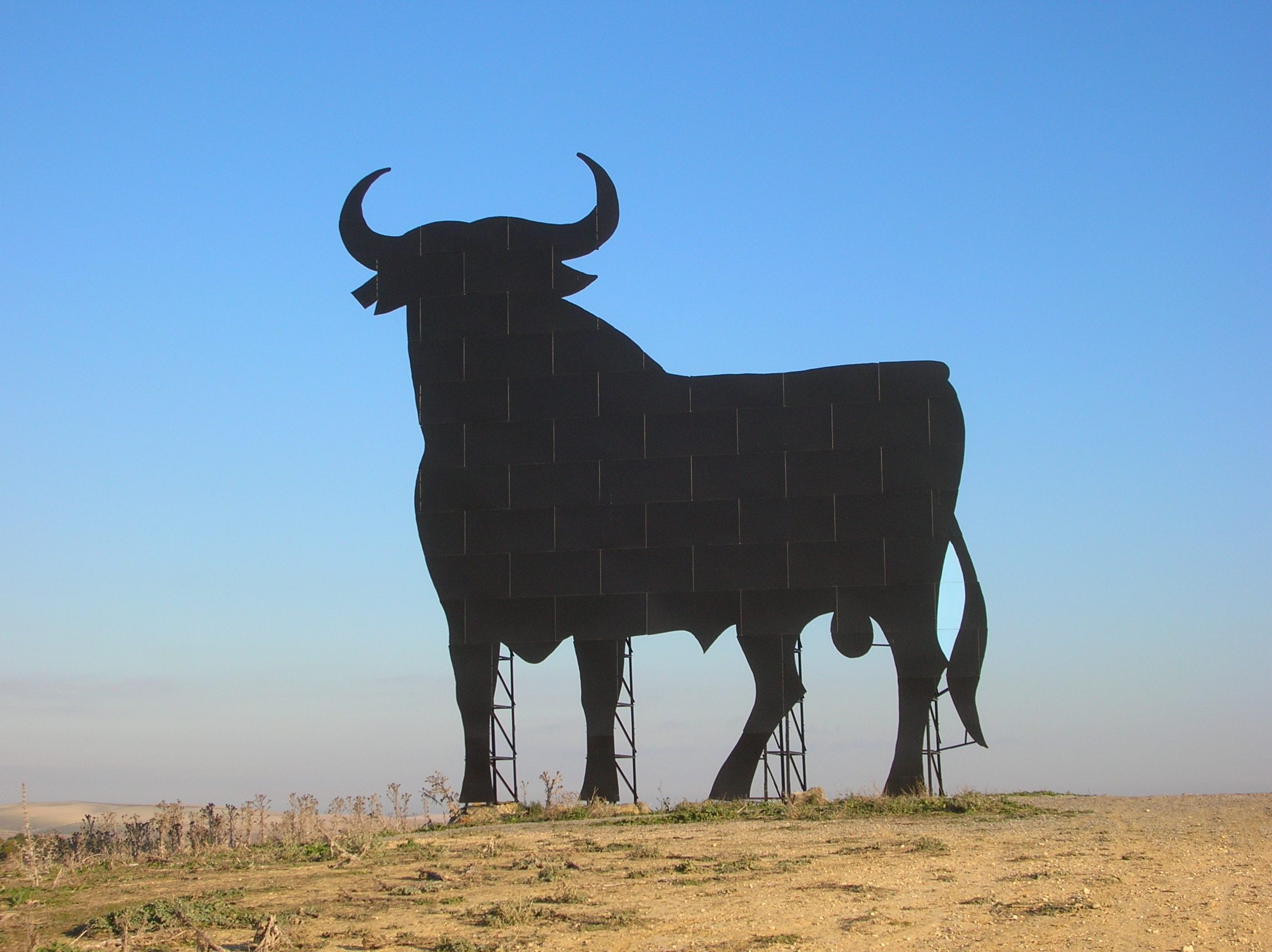 Taureau d'Osborne près de Las Cabezas de San Juan (Séville, Espagne)